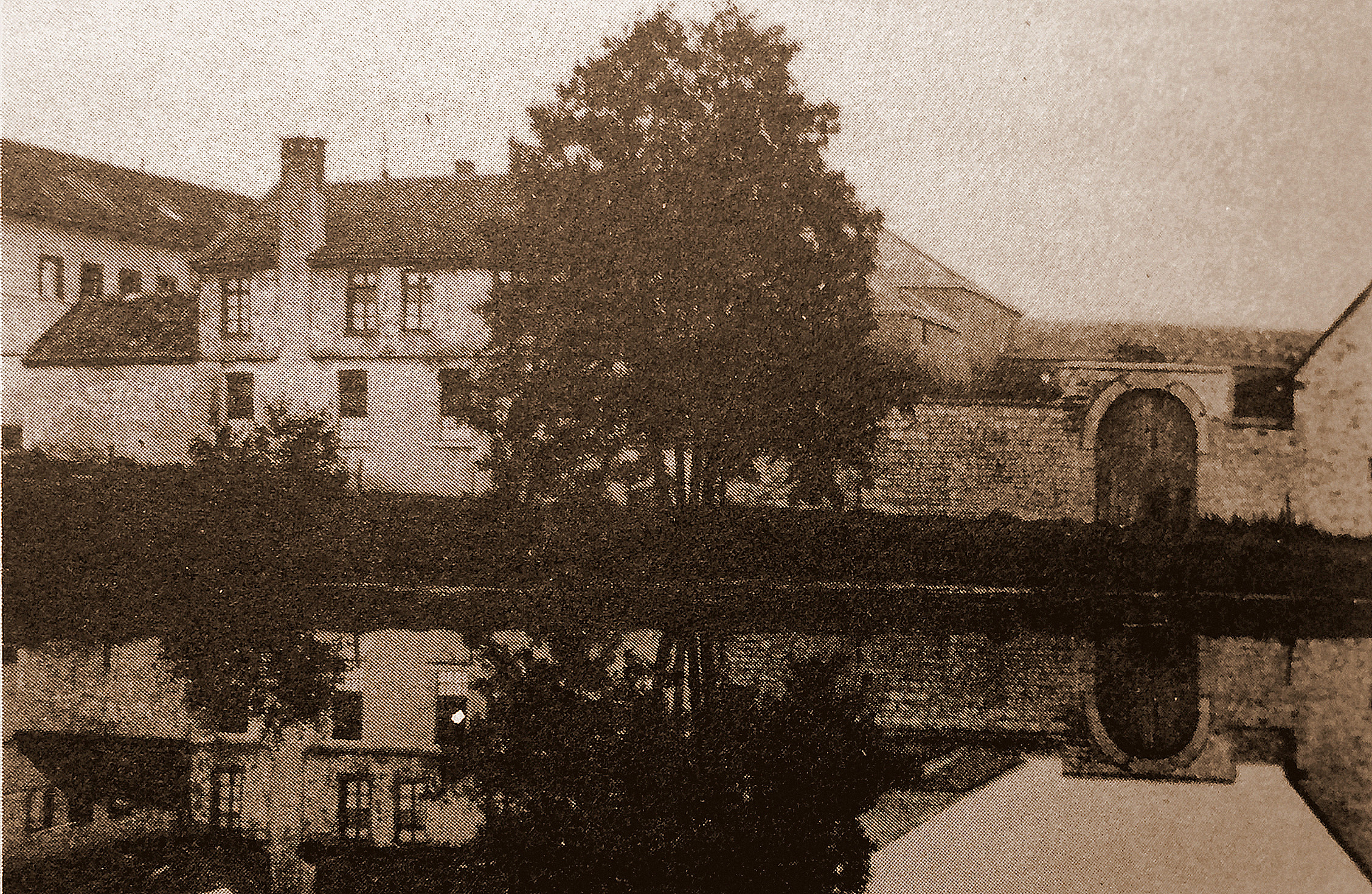 Scan einer alten Postkarte vom Gut Buschberg in Eupen-Kettenis, der ersten Tuchfabrik der Familie Grand RY